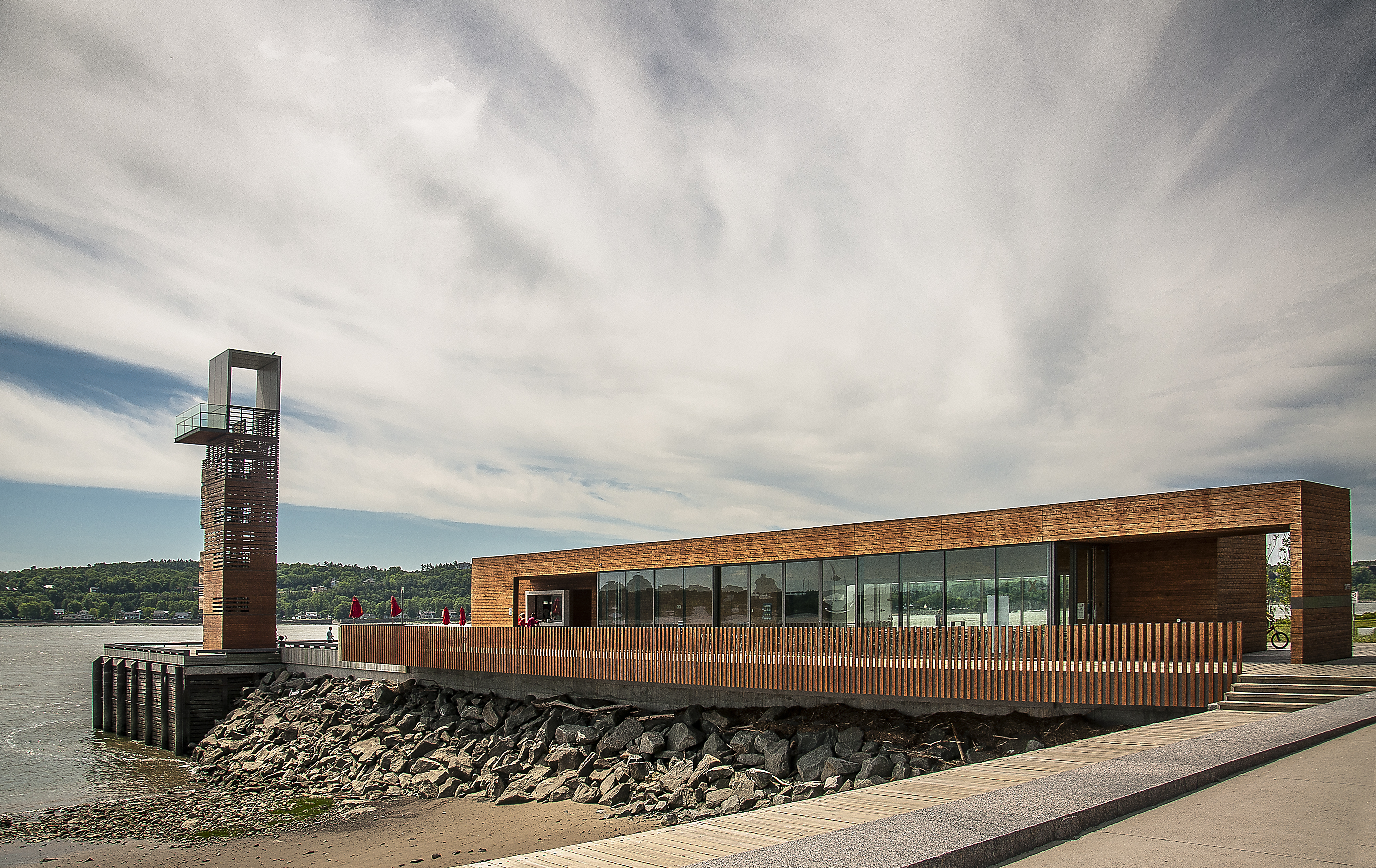 La Station des Cageux, observatoire à mi-chemin de la promenade Samuel-de-Champlain